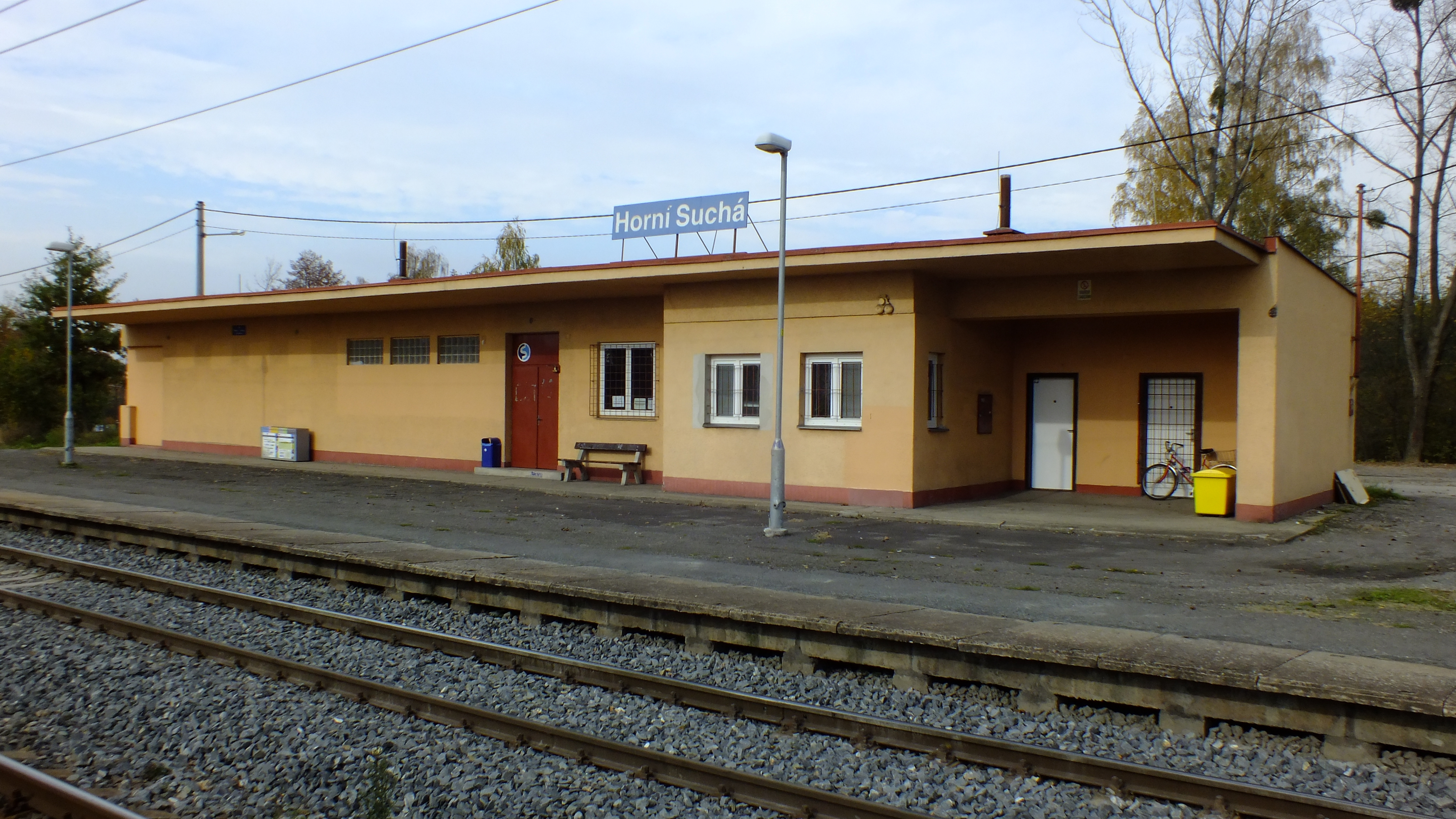 Staniční Budova